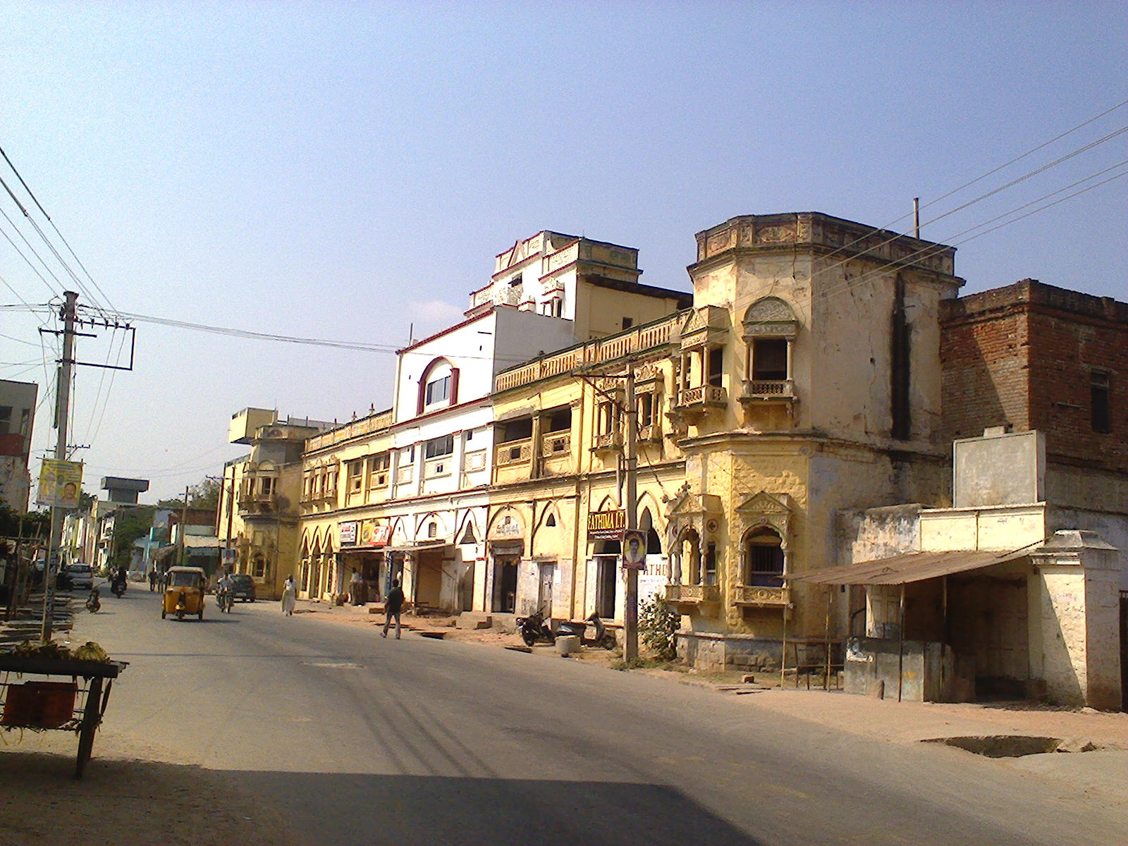 కృష్ణారెడ్డి బంగళా